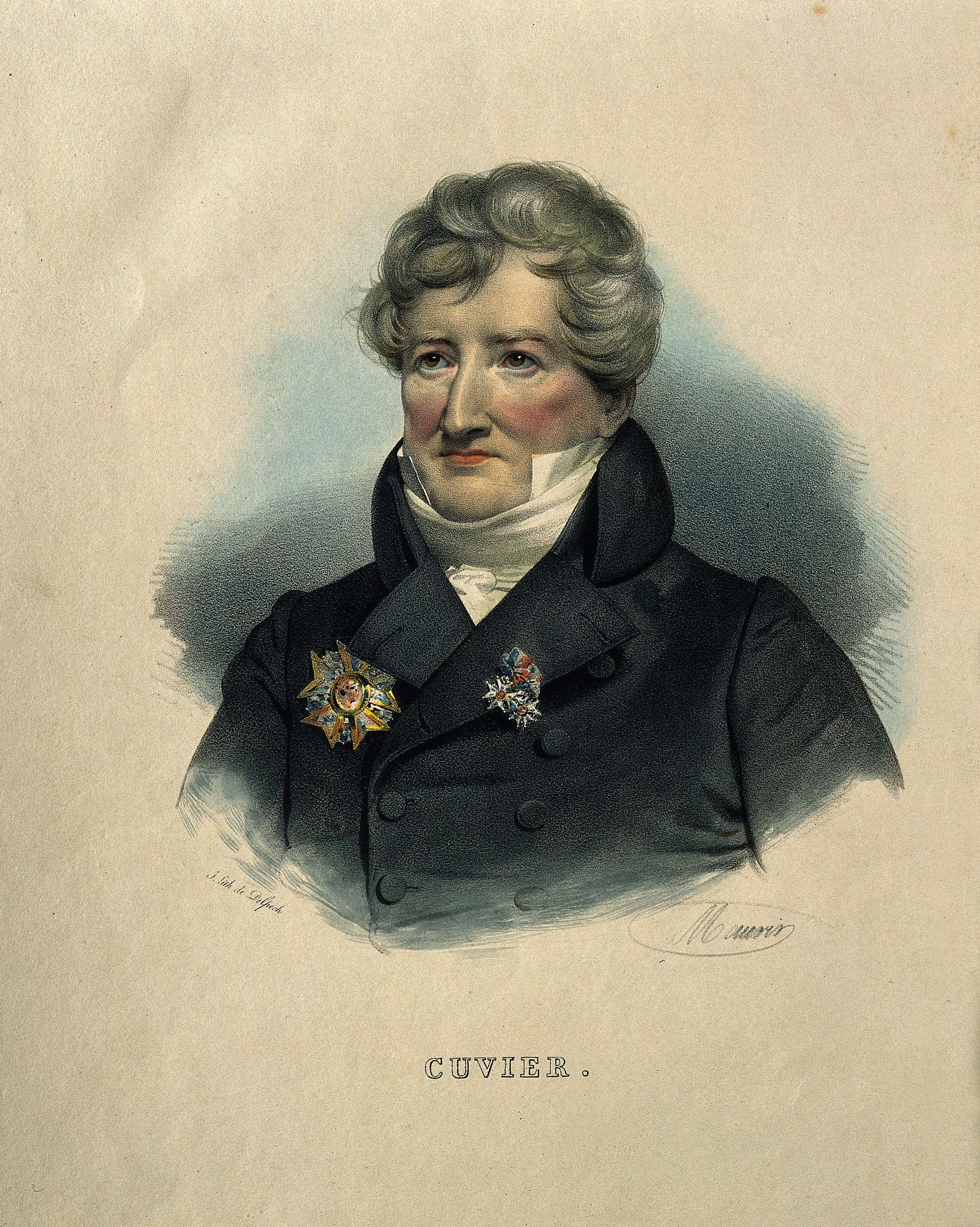 Genre/Technique: Portrait prints. Lithographs. Subject name: Cuvier, Georges, baron, 1769-1832.